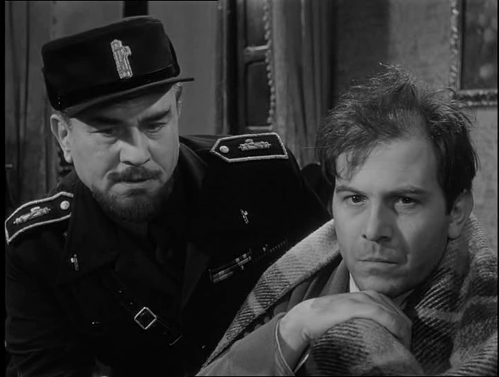 screenshot from La lunga notte del '43 (1960)